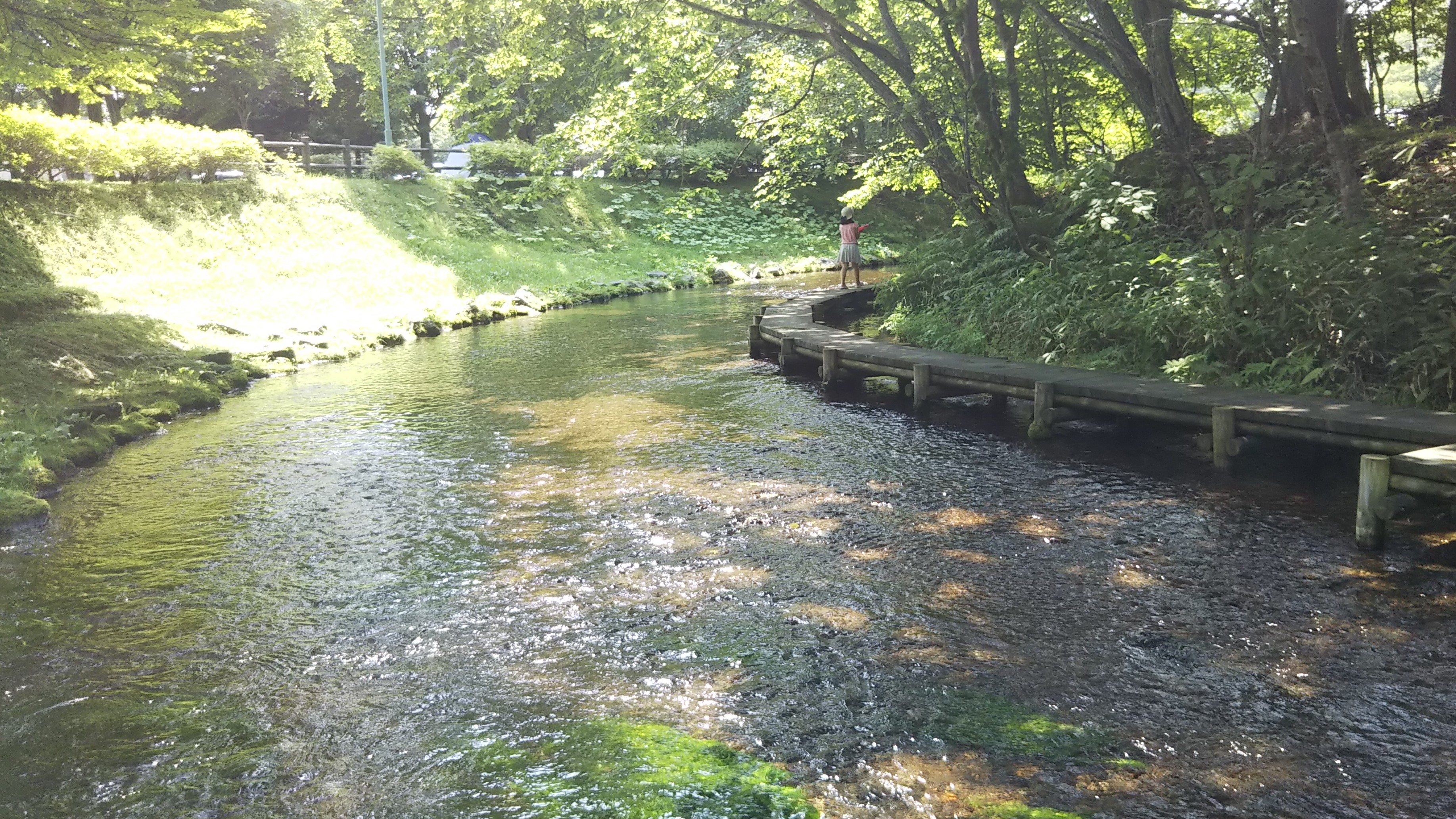 北海道千歳市 名水ふれあい公園内のナイベツ川と遊歩道